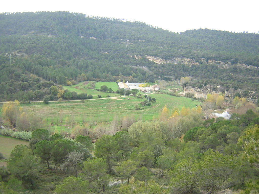 Els Campassos (Monistrol de Calders, Moianès)